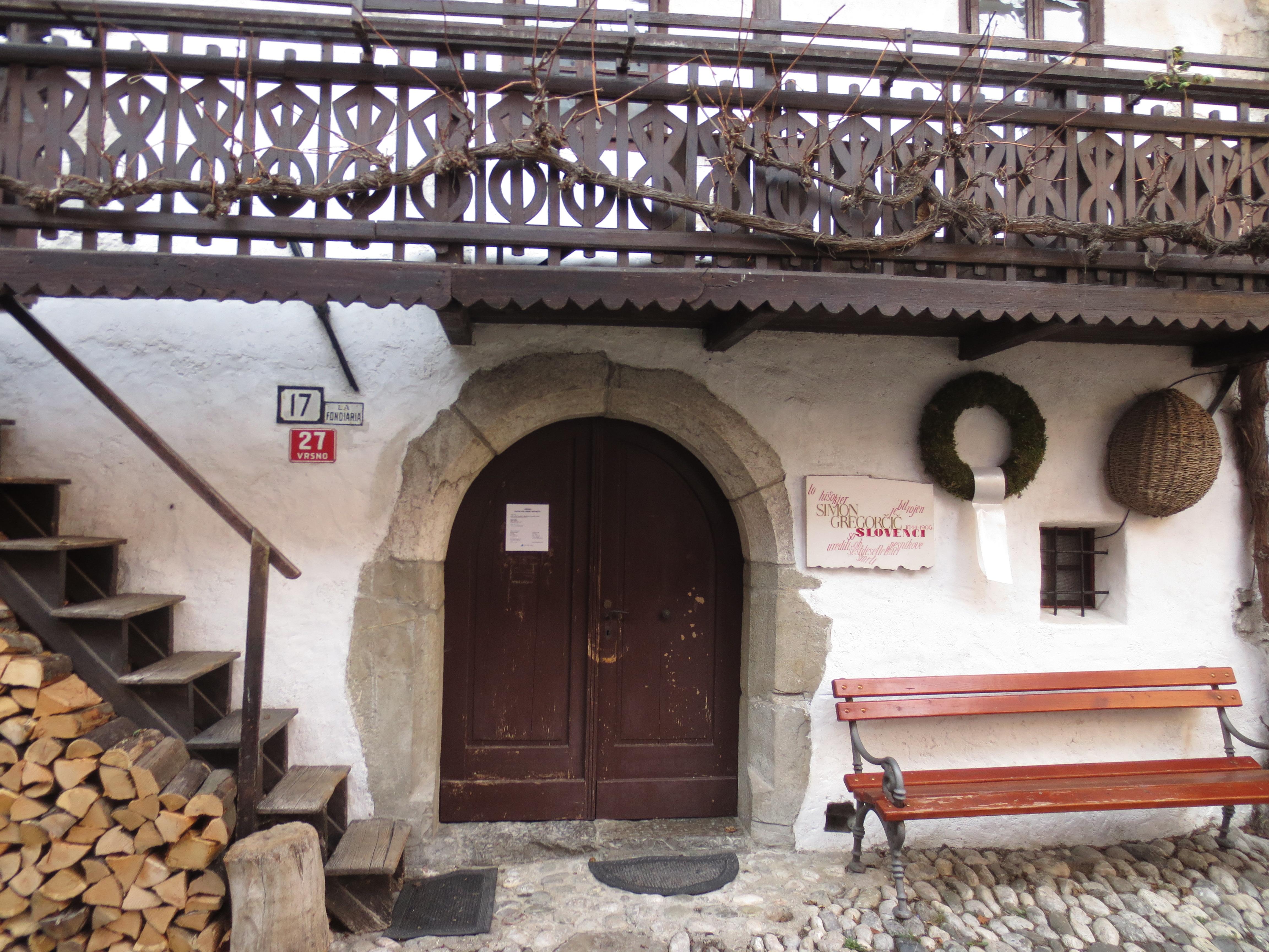 Gregorčičeva rojstna hiša na Vrsnem.